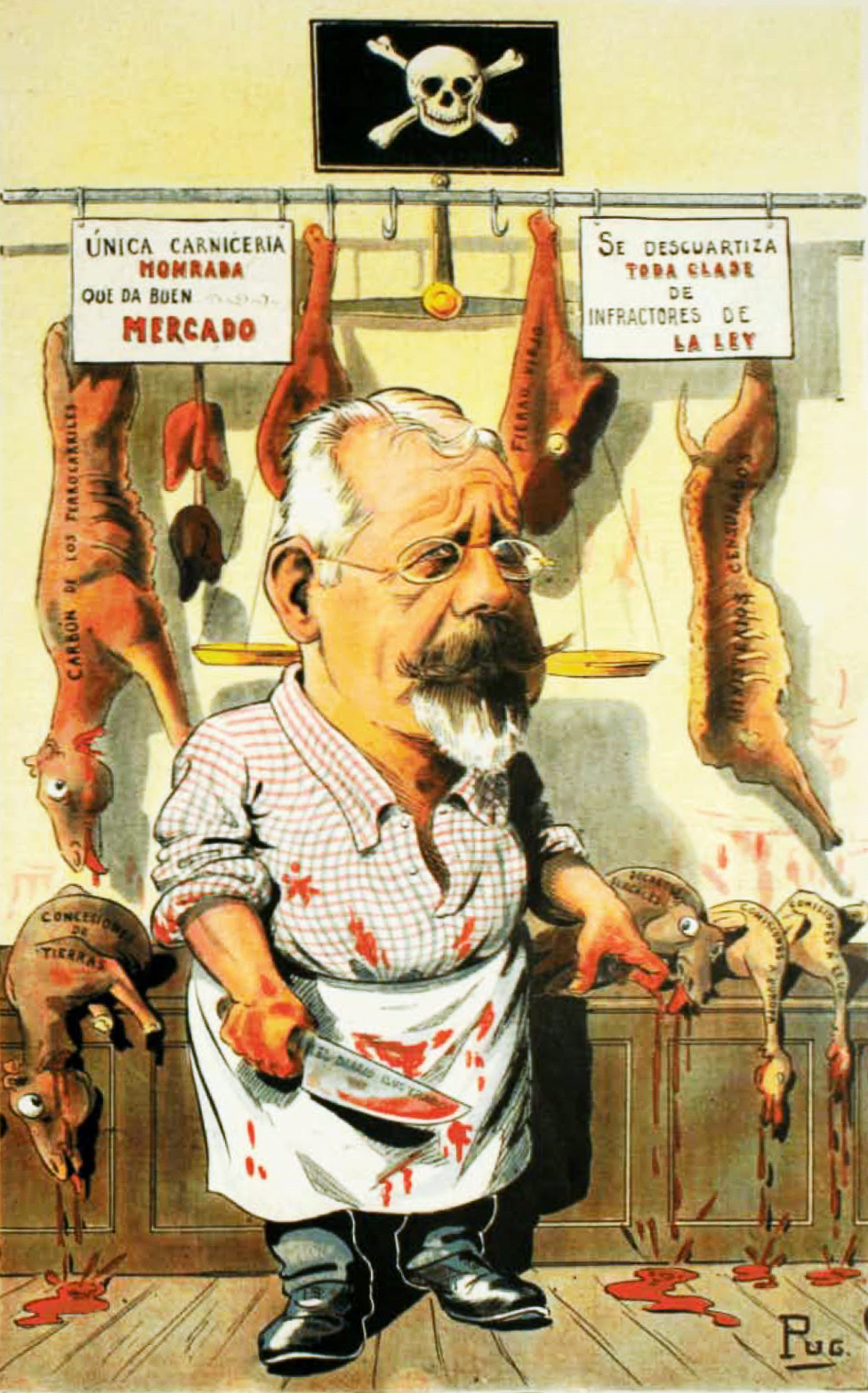 Caricatura del Presidente de Chile Germán Riesco, que ilustra el " mitin de la carne". Caricatura de Pug en Revista Zig-Zag